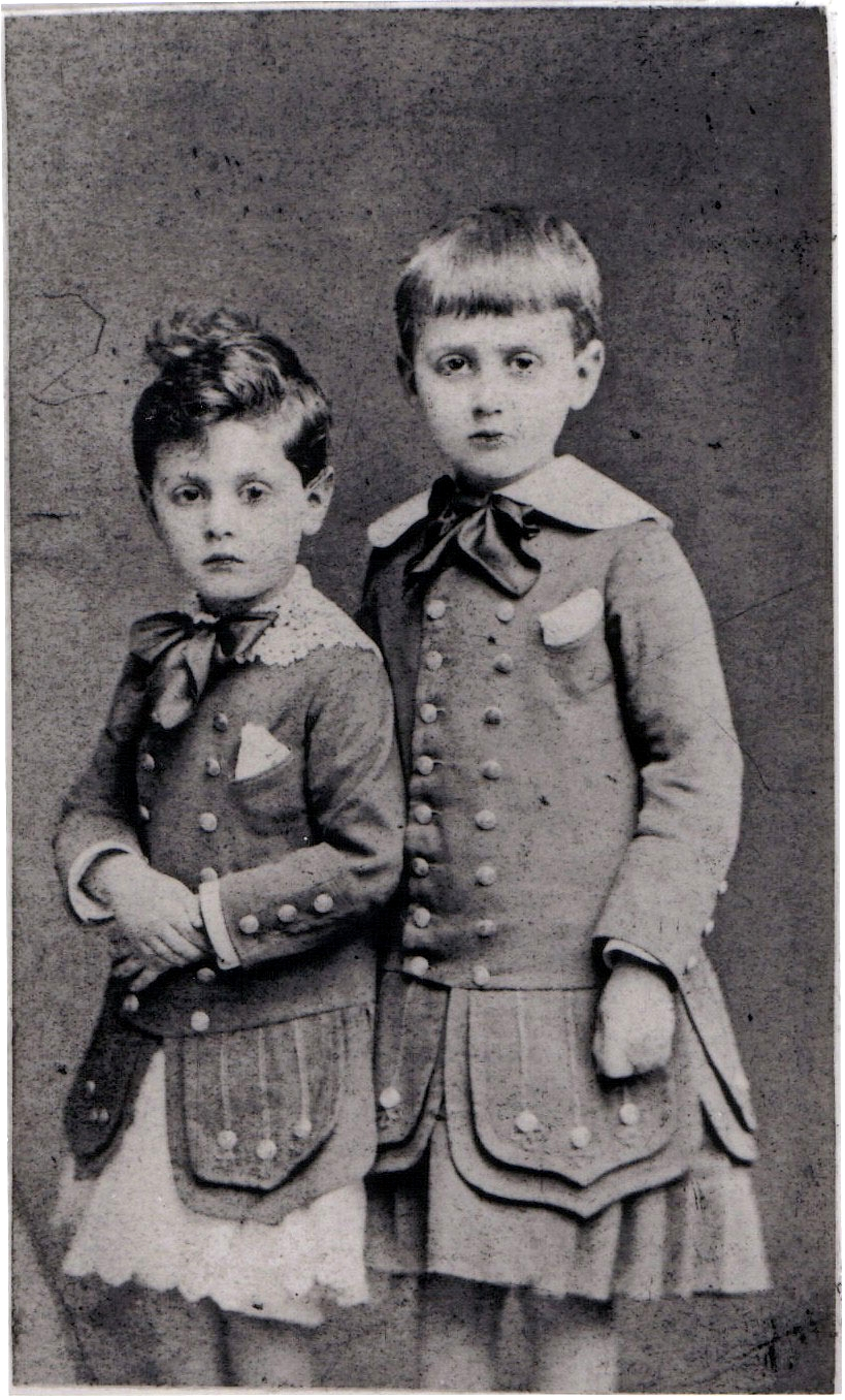 Robert et Marcel Proust (à droite) vers 1877. Sur carton du photographe Modeste Chambay, photographe au Grand-Hôtel, Paris. Fond Roger-Violet.